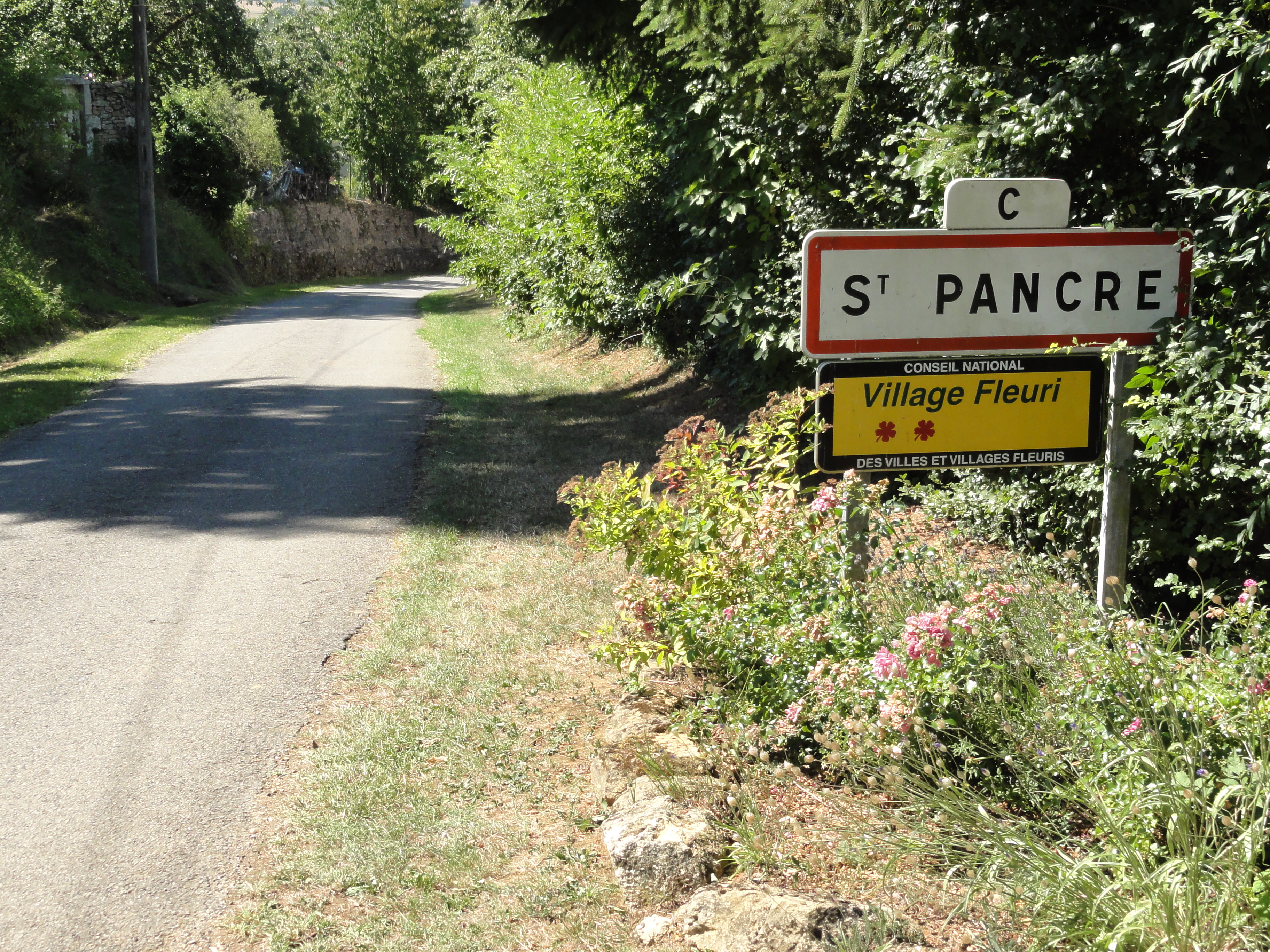 Saint-Pancré (Meurthe-et-M.) city limit sign